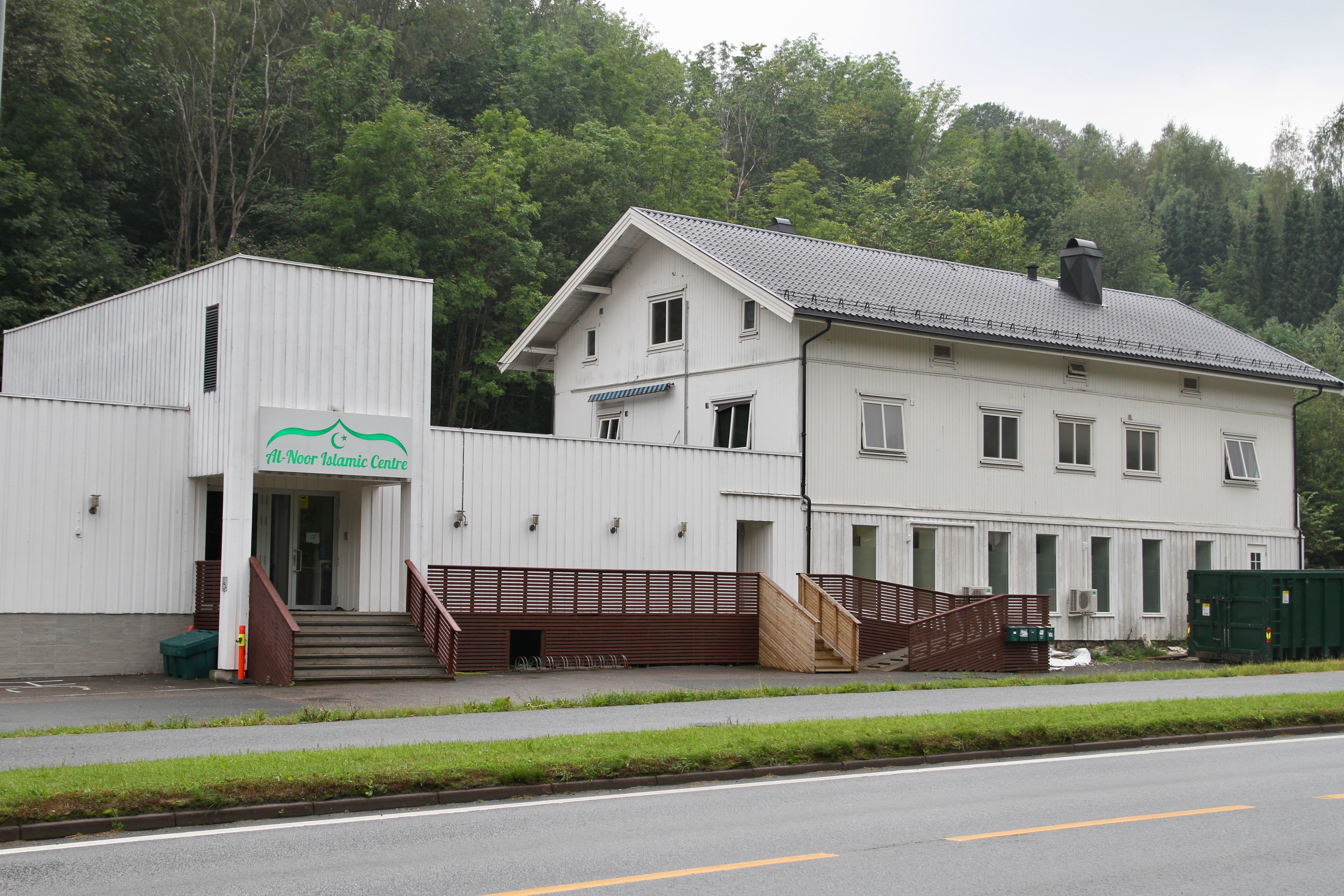 Al-Noor Islamic Centre i Bærum.